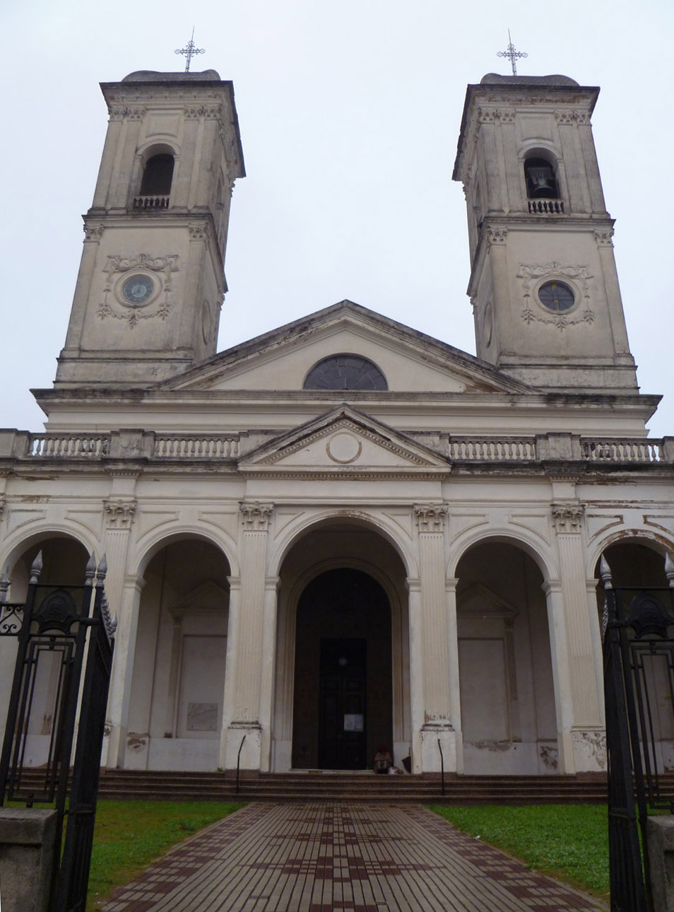 Antica cattedrale della diocesi di Minas, concattedrale della diocesi di Maldonado-Punta del Este-Minas.